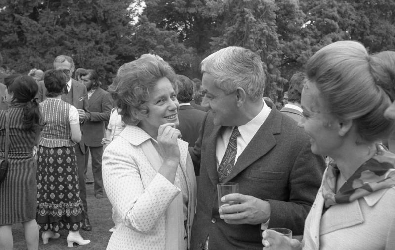 Bundeskanzler Willy Brandt empfängt Filmschauspieler